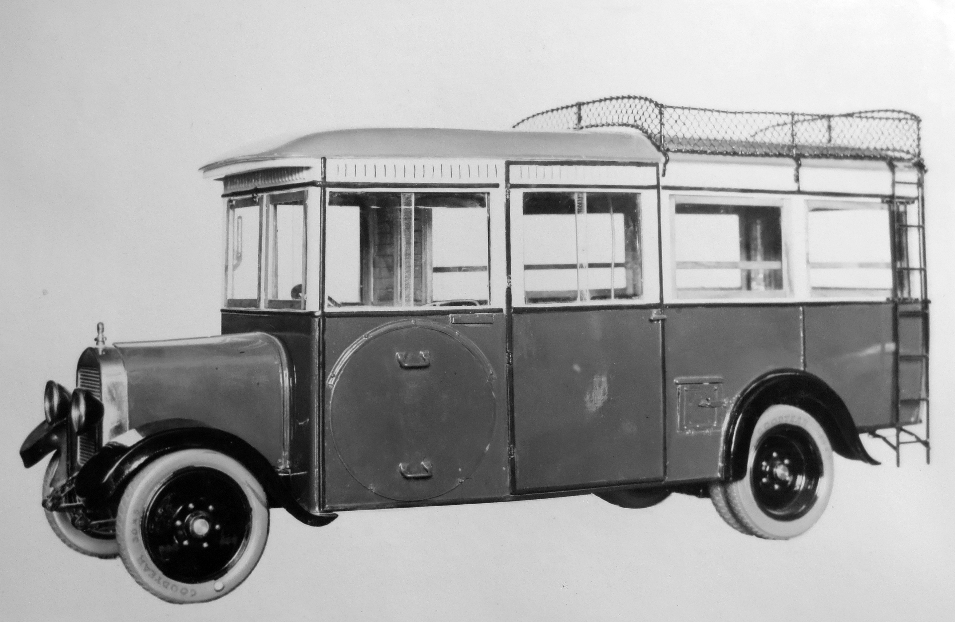 Walter Commercial, autobus (1931)